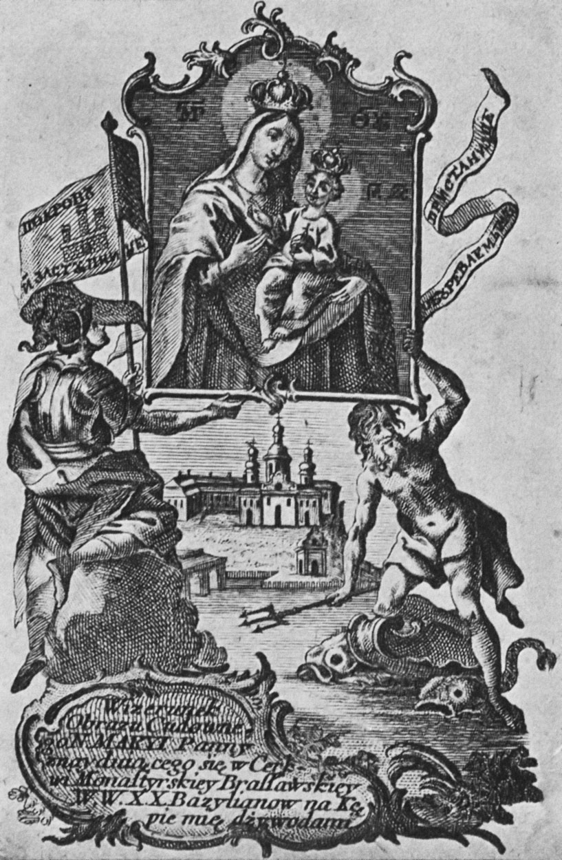 Беларуская (тарашкевіца): Браслаў (Brasłaŭ). Манастыр і цудоўны абраз Маці Божай